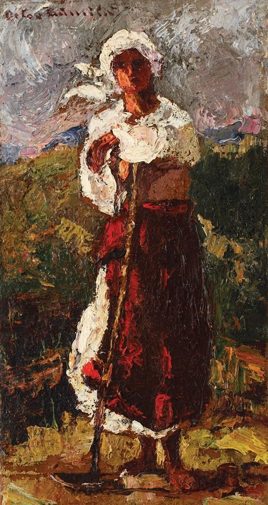 Țărăncuță, ulei pe pânză, 37,5 × 20 cm, semnat stânga sus, cu brun, Octav Băncilă